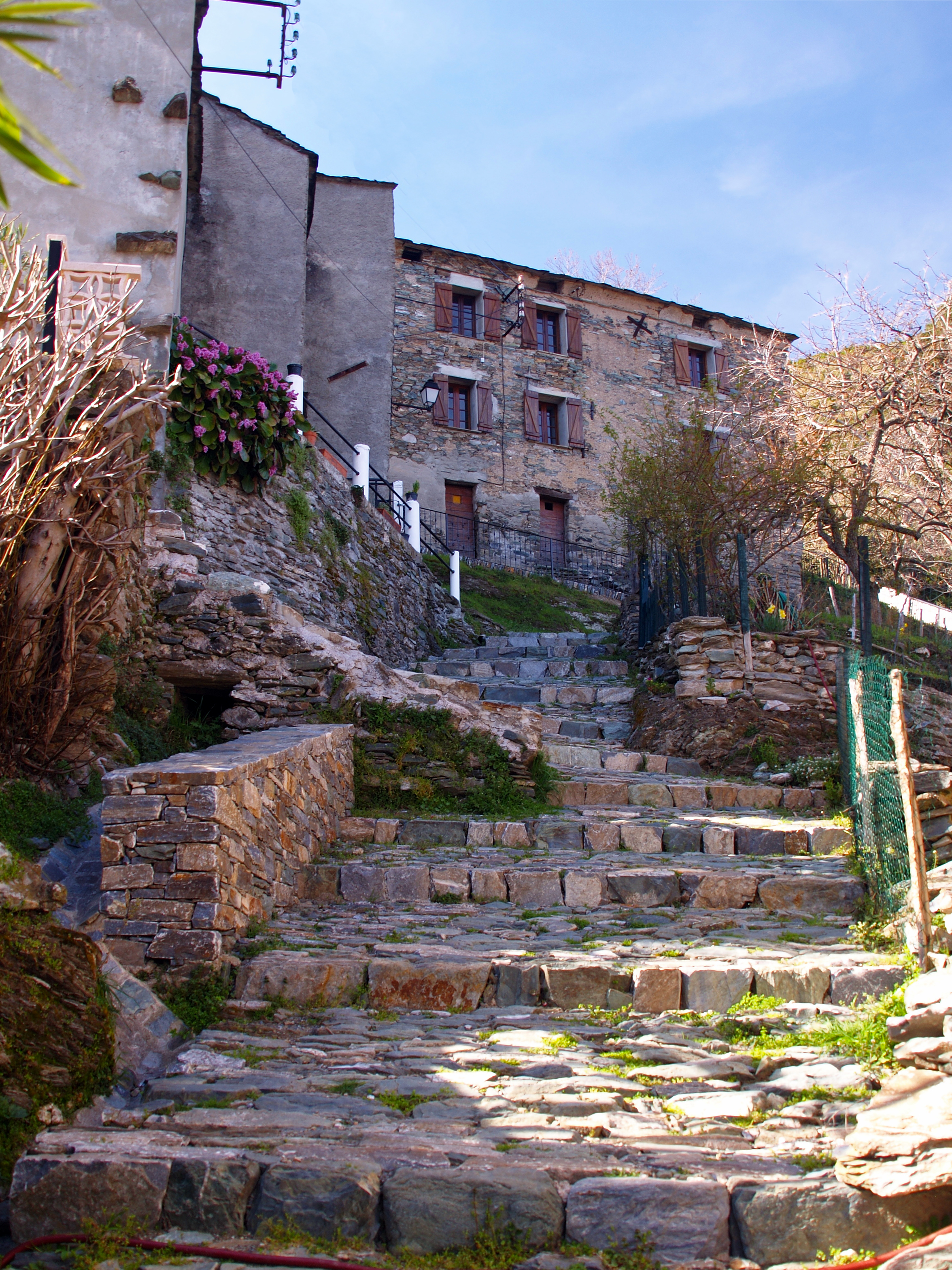 Giocatojo - Hameau de Lutina